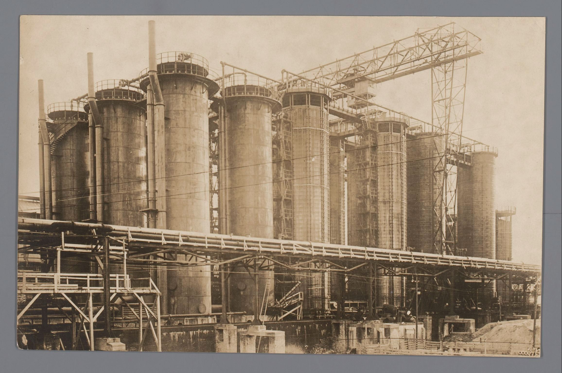 IdentificatieTitel(s): Stikstoffabriek in Oppau, DuitslandObjecttype: foto Objectnummer: RP-F-00-6337Opschriften / Merken: etiket, verso midden, in typoscript: ‘Die Deutsche Stickstoff, Abilin//und Sodagewinnung.//369. Unser Bild zeig [sic] uns die Salz//petersäurenfabrik Oppau, mit ihren //Absorptionstürmen.//Text ohne Gewähr.’stempel, verso, in paarse inkt: ‘A.GROSS//Jllustrations-Verlag[sic]//Berlin SW68//Zimmerstr. 48b’VervaardigingVervaardiger: fotograaf: A. Gross (vermeld op object)uitgever: A. Gross (vermeld op object)Plaats vervaardiging: BerlijnDatering: ca. 1910 - voor 21-sep-1921Fysieke kenmerken: ontwikkelgelatinezilverdrukMateriaal: papier Techniek: ontwikkelgelatinezilverdrukAfmetingen: foto: h 111 mm × b 171 mmkarton: h 111 mm × b 171 mmOnderwerpWaar: DuitslandVerwerving en rechtenCredit line: Schenking van de heer W. Diepraam, AmsterdamVerwerving: schenking 1996Copyright: Publiek domein